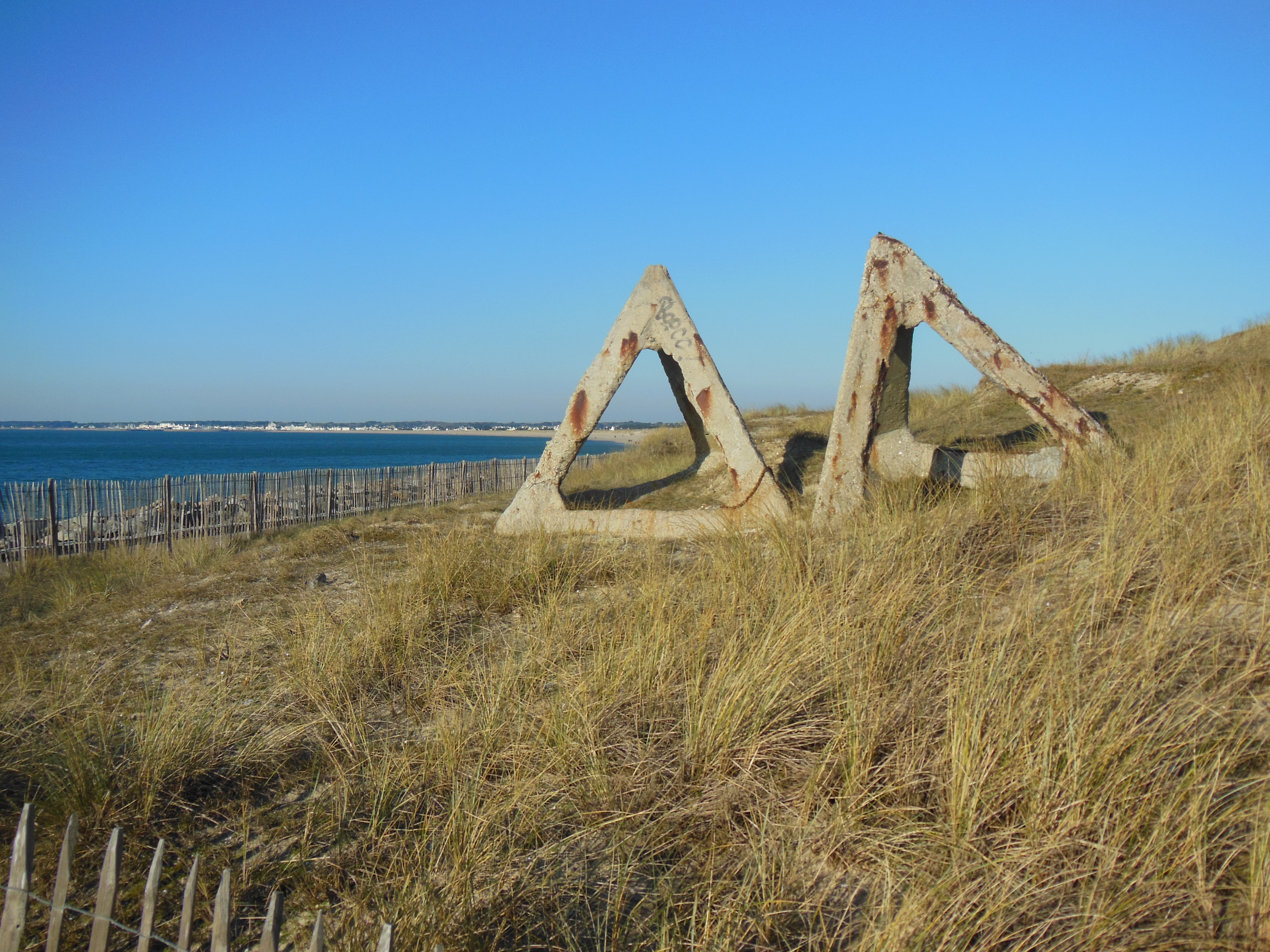 Tétraèdres de Pen Bron, commune de La Turballe, Loire-Atlantique, France